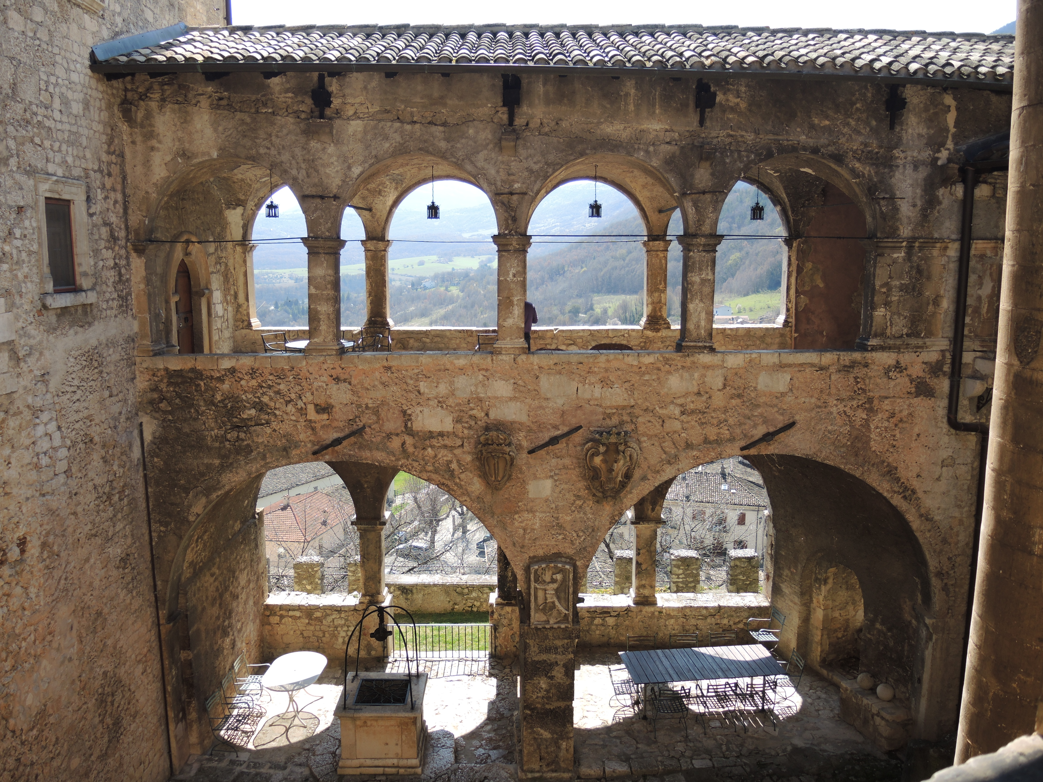 Castello di Gagliano Aterno